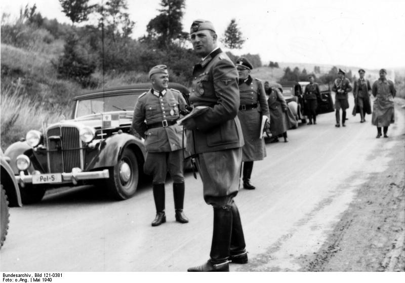 Fahrt durch Burgund l.: Mj. Kurring, Flugkapitän O. Pol.(Ordnungspolizei); Daluege; Hptm. Rümler